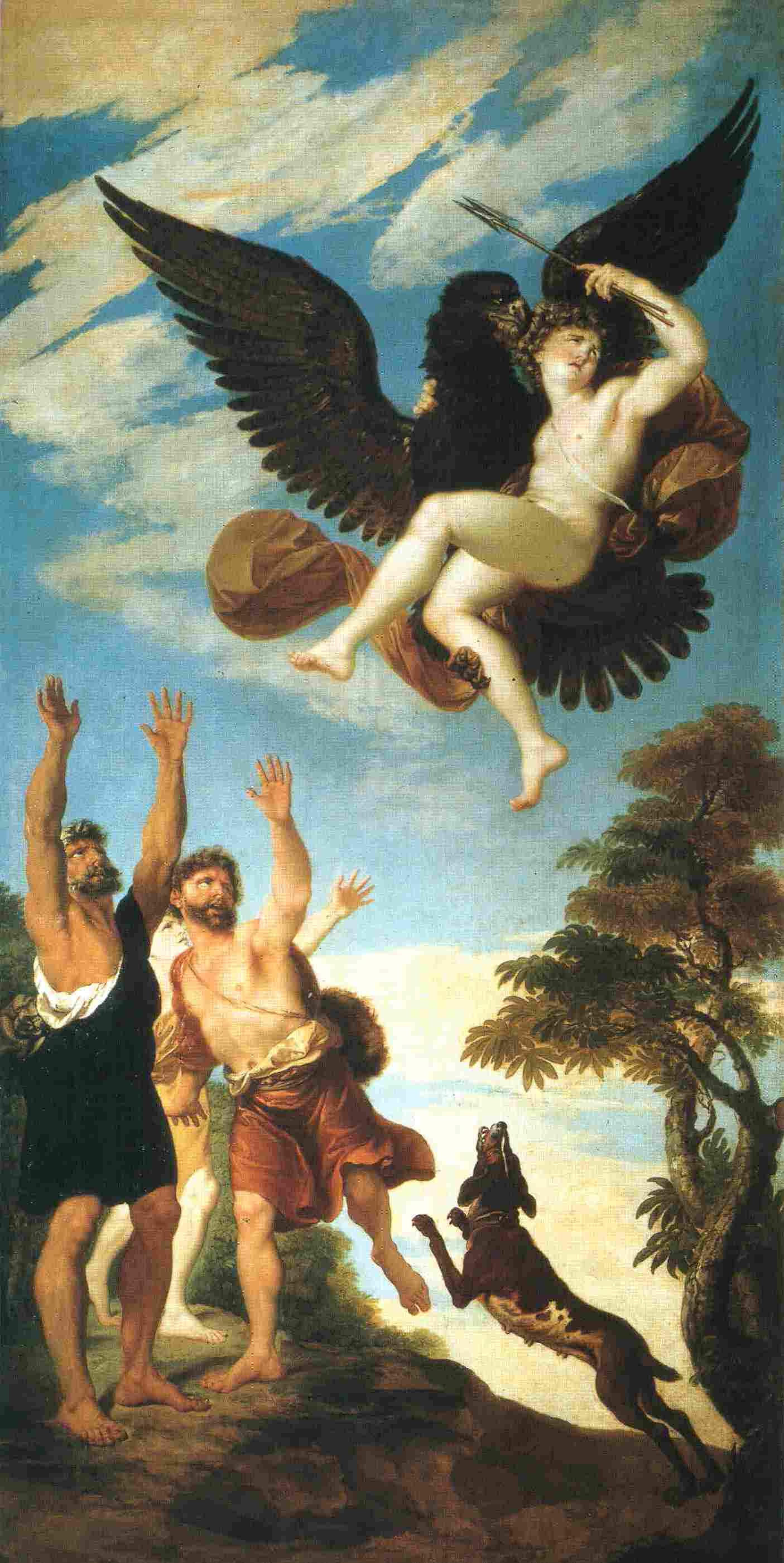 Il ratto di Ganimede, olio su tela di Julien de Parme. Museo del Prado, Madrid.